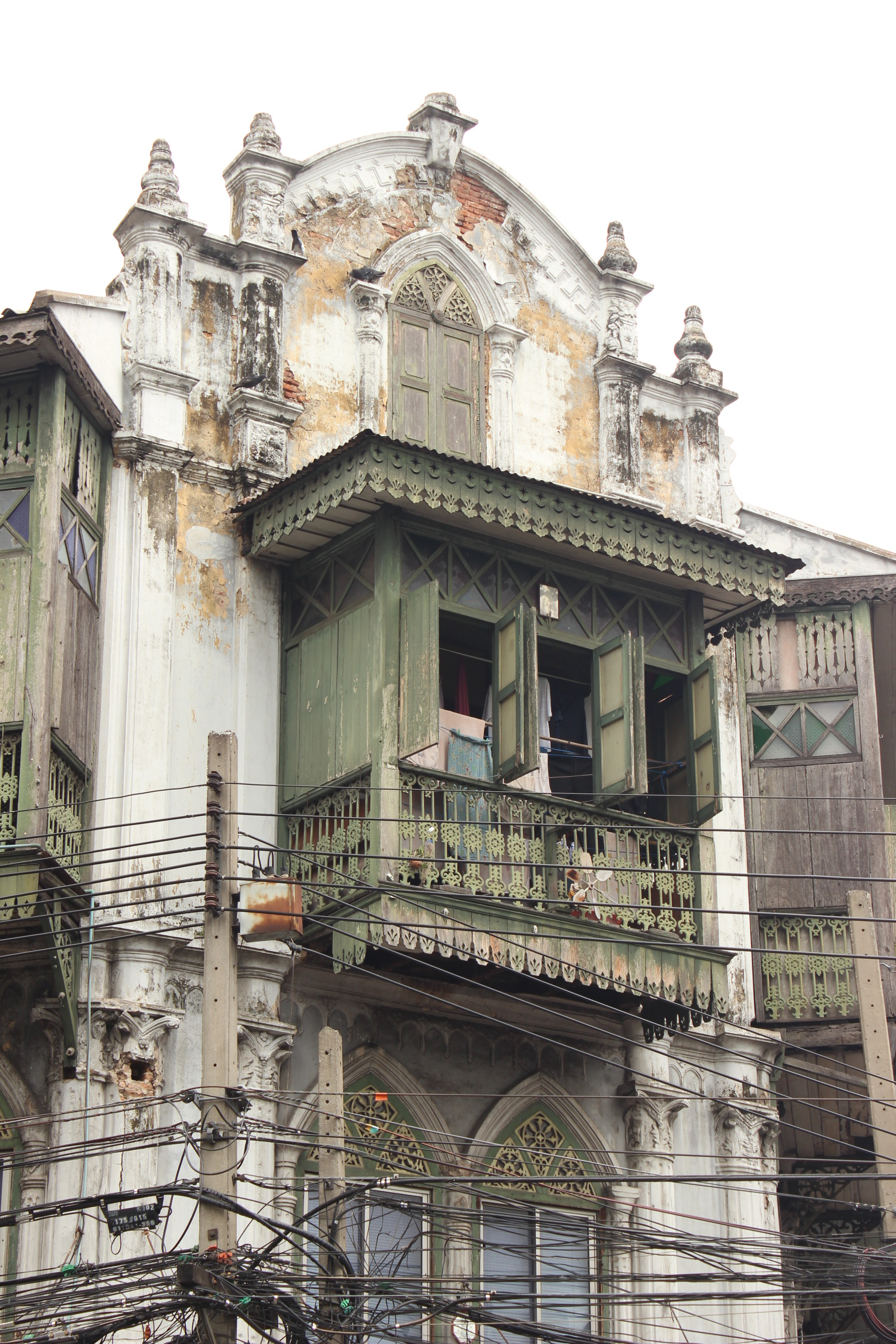 ตึกแถวริมถนนทรงวาด ชื่ออื่น (ถ้ามี) ที่ตั้ง เลขที่ ๑๘๕๖ – ๑๘๗๒ ถนนทรงวาด สัมพันธวงศ์ กรุงเทพมหานคร